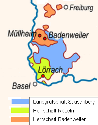 Kartenskizze der Landgrafschaft Sausenberg